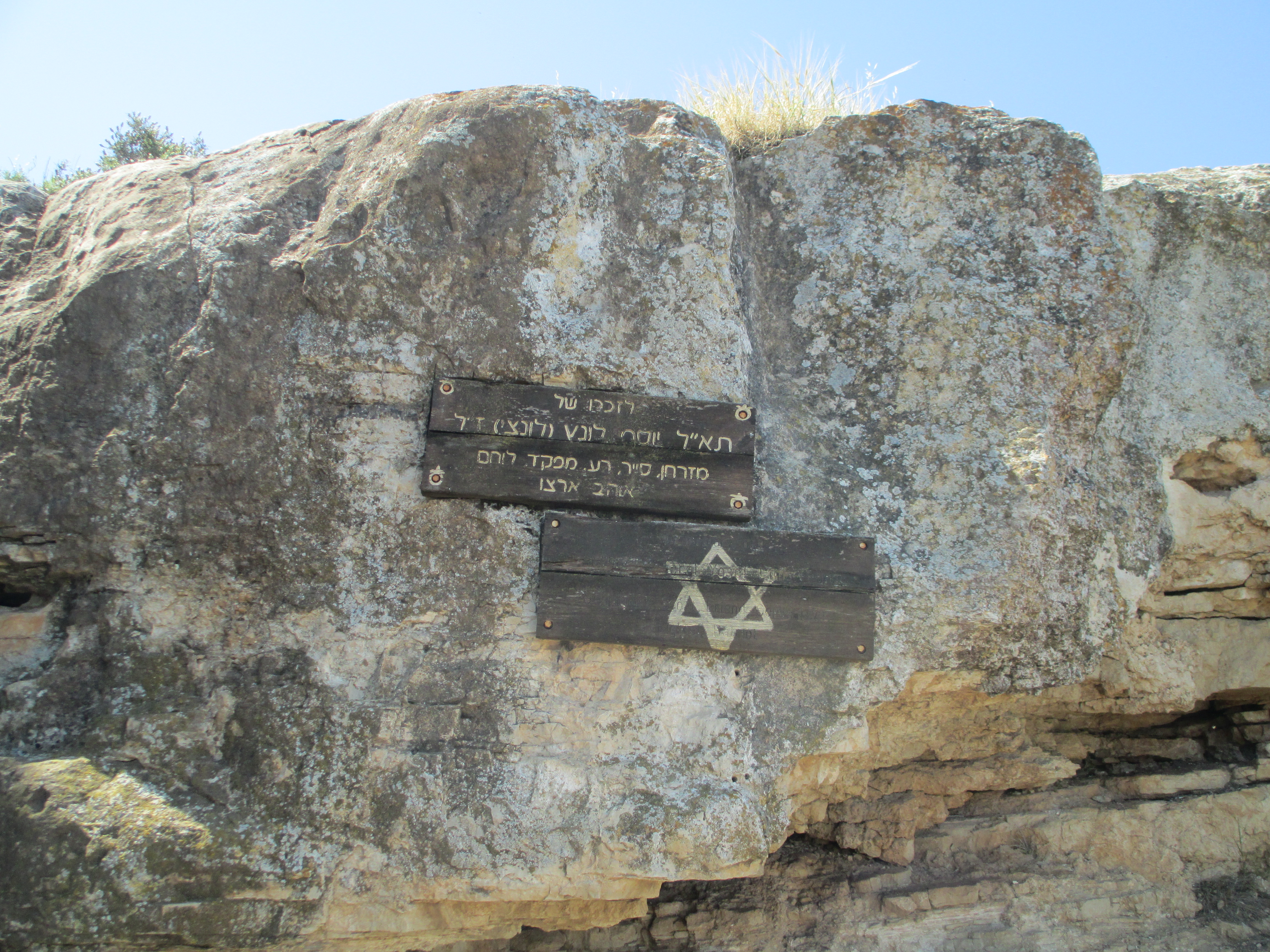 מצפה לונץ בהר כביר